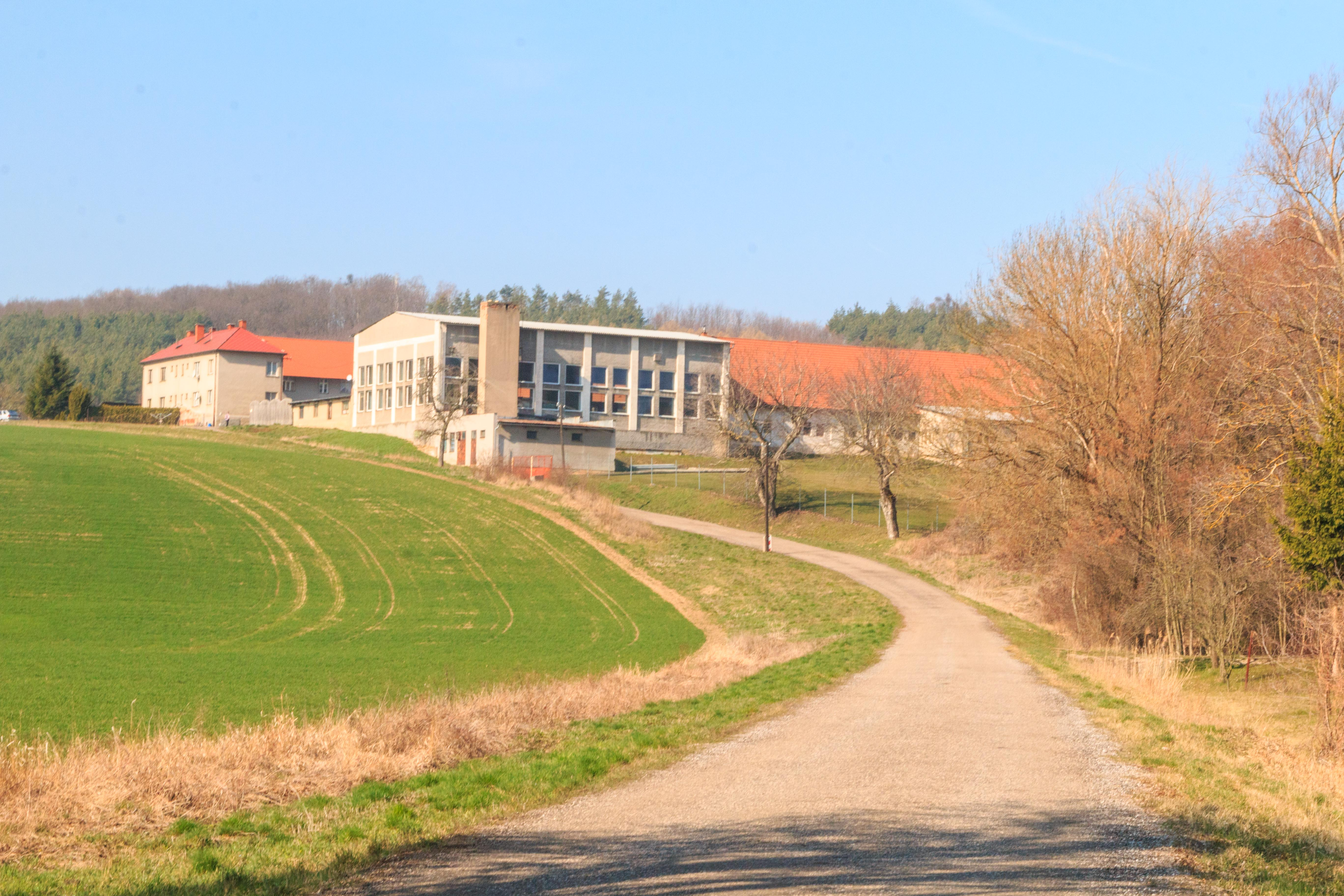 Hospodářský dvůr Milkovice